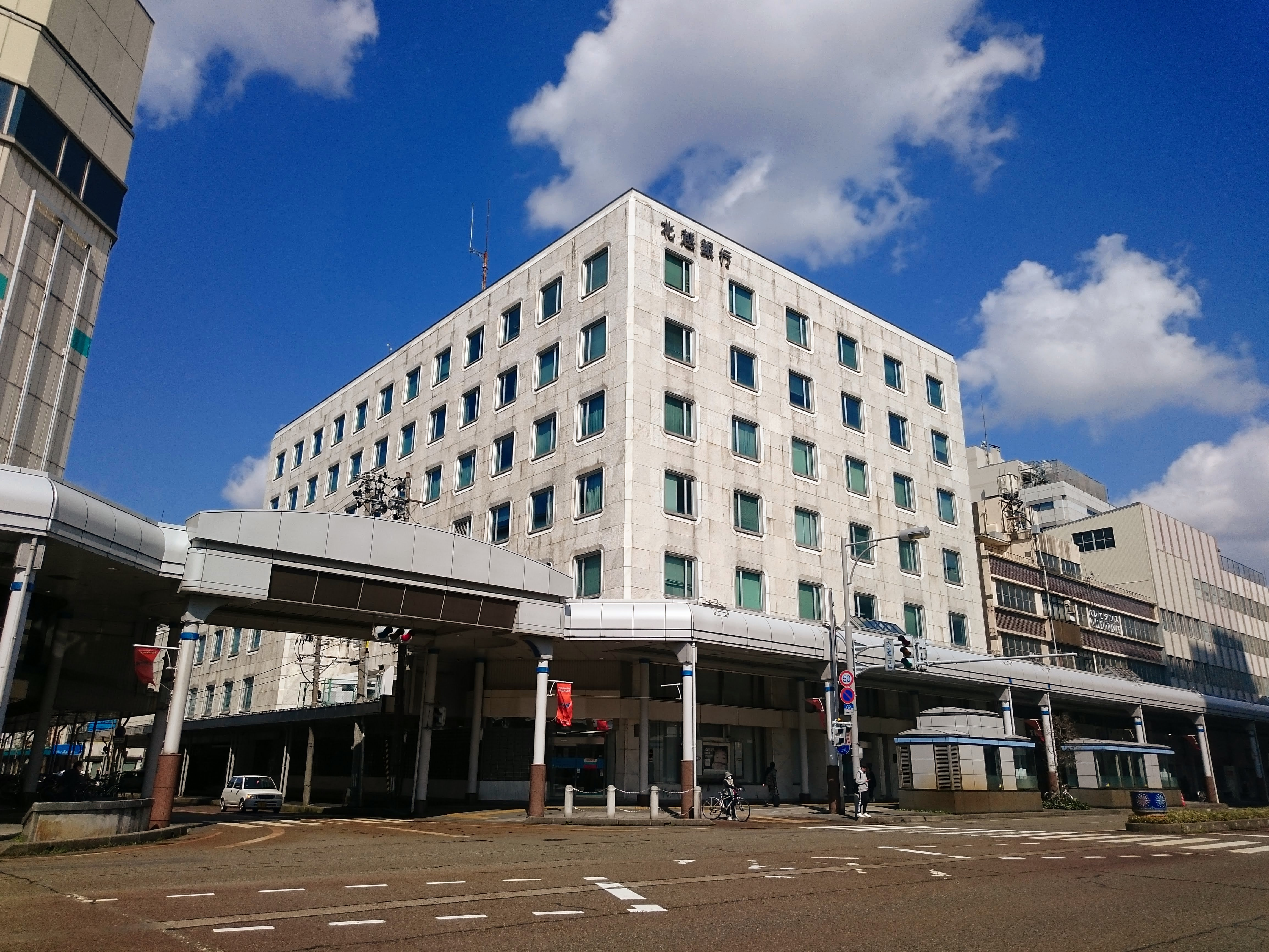 北越銀行本店営業部建物外観